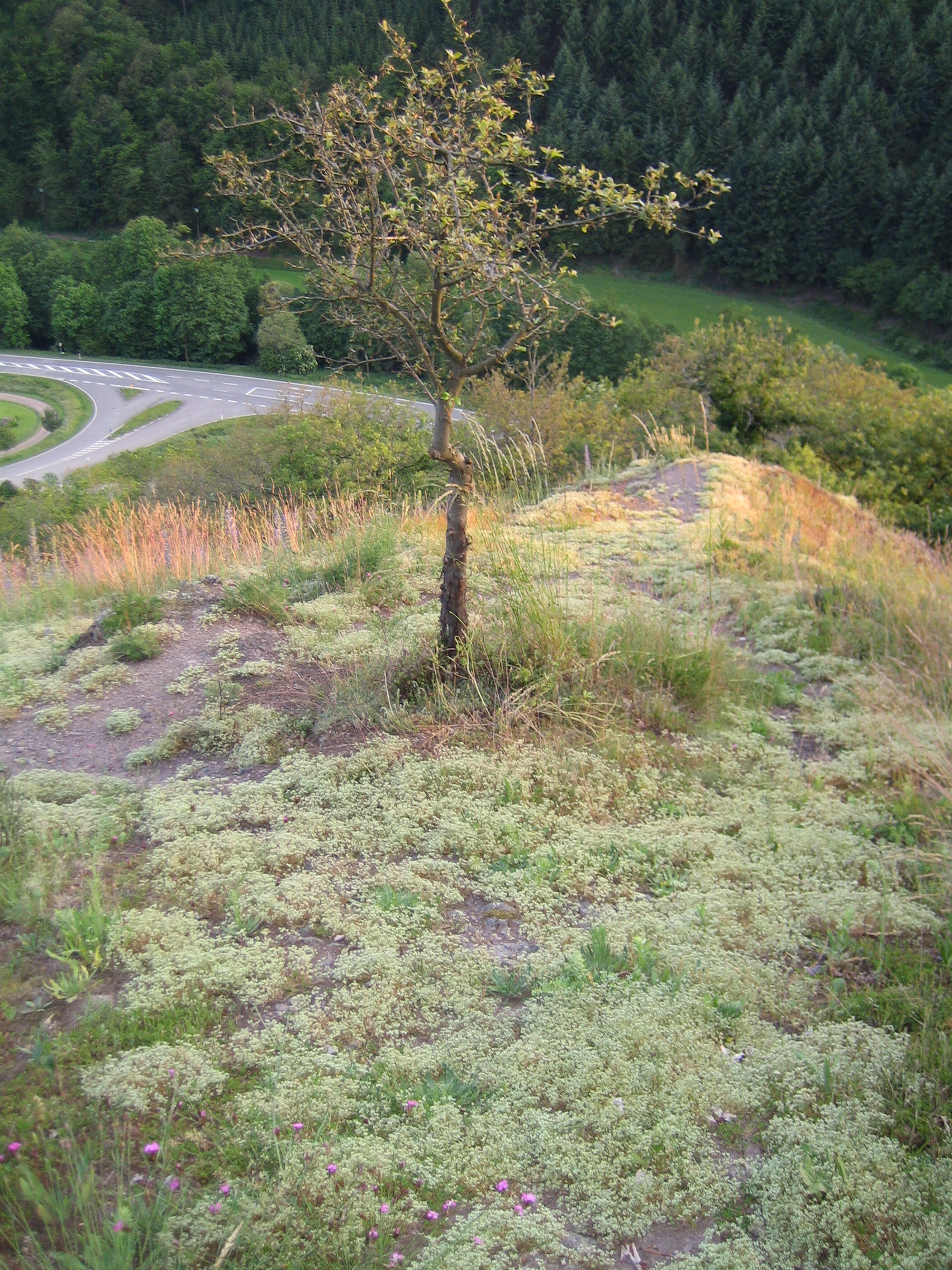 Vegetation auf den Felsen im Naturschutzgebiet „Mittagsfels“ (NSG 7336-026) in Niederalben, Rheinland-Pfalz